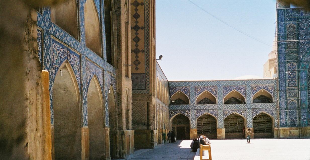 La grande cour de la Mosquée du vendredi. Cette mosquée est l'assemblage de plusieurs mosquées et madrasas dont la construction s'étire du XIe siècle au XVIIIe siècle offrant ainsi toutes les variantes de l'architecture musulmane iranienne (Ispahan).